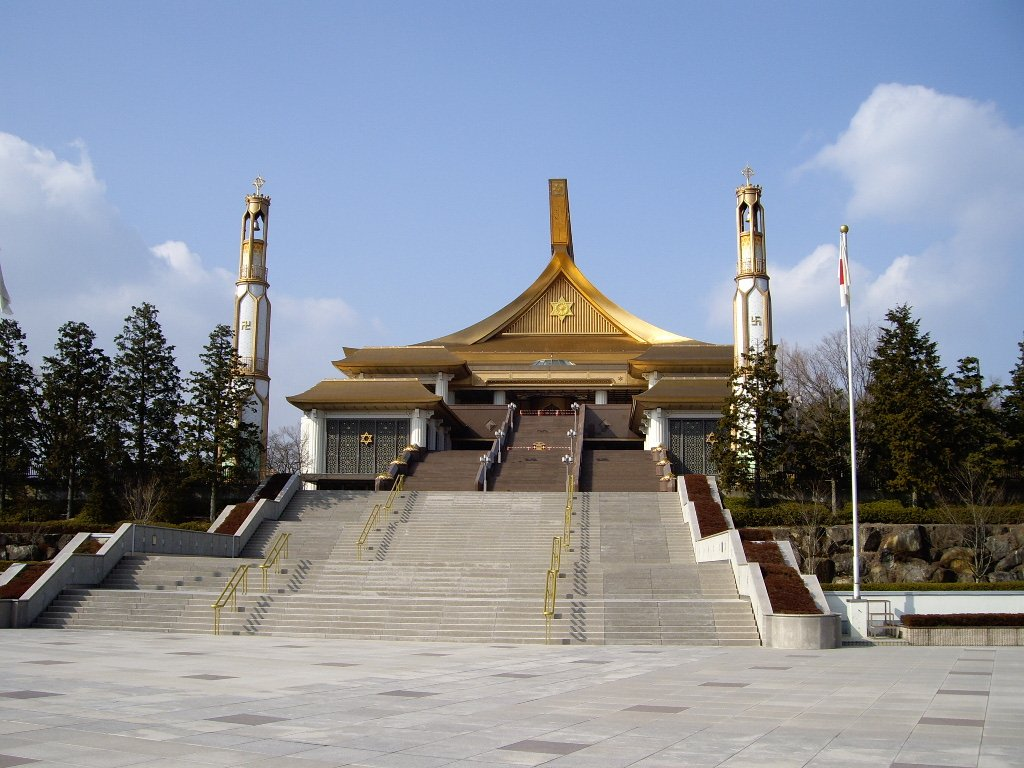 崇教真光世界総本山（日本岐阜県高山市）, Sukyo Mahikari Headquarter (Takayama City, Gifu, Japan)